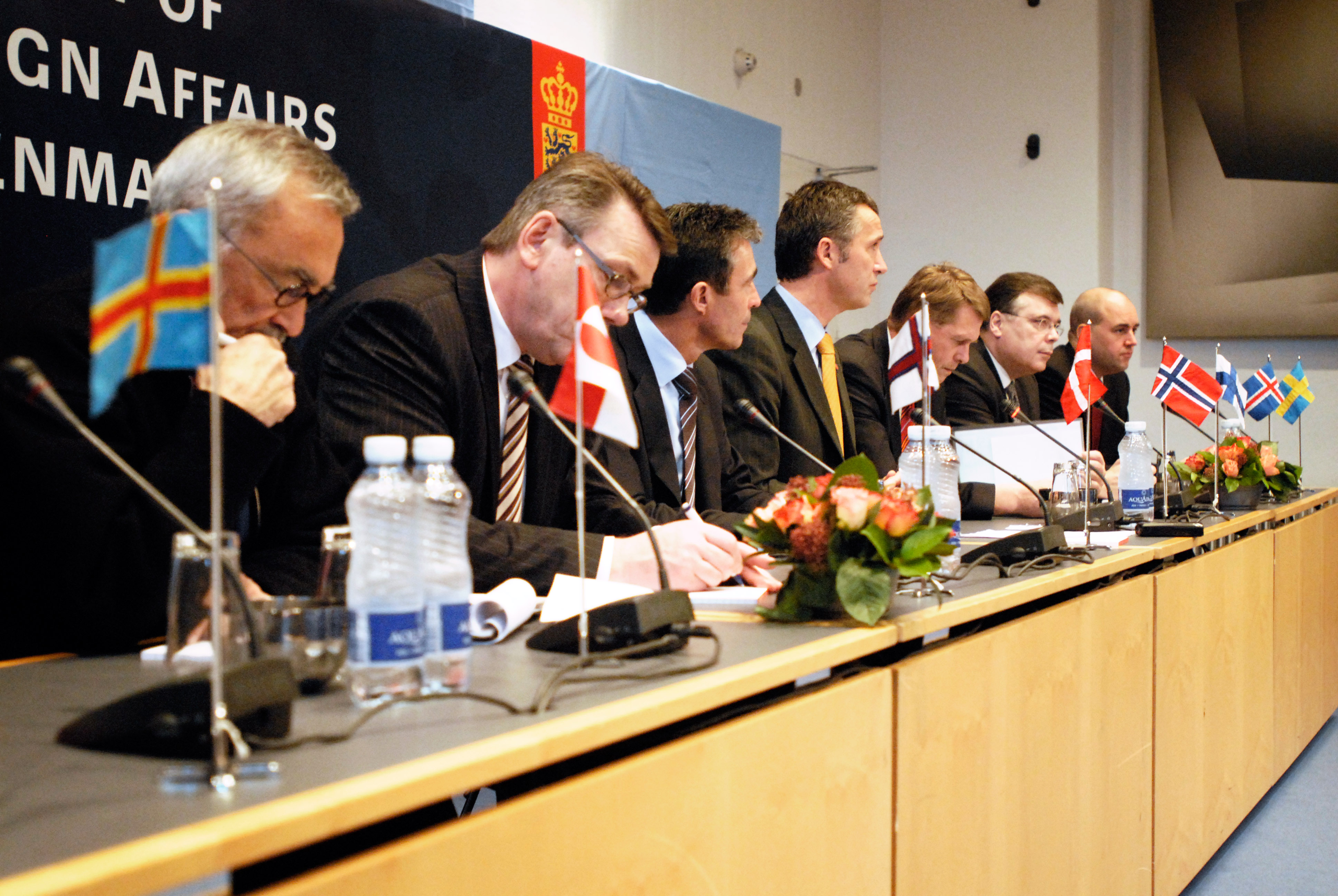 De nodiska statsministrarna håller pressmöte under Nordiska rådets session i Köpenhamn 2006.